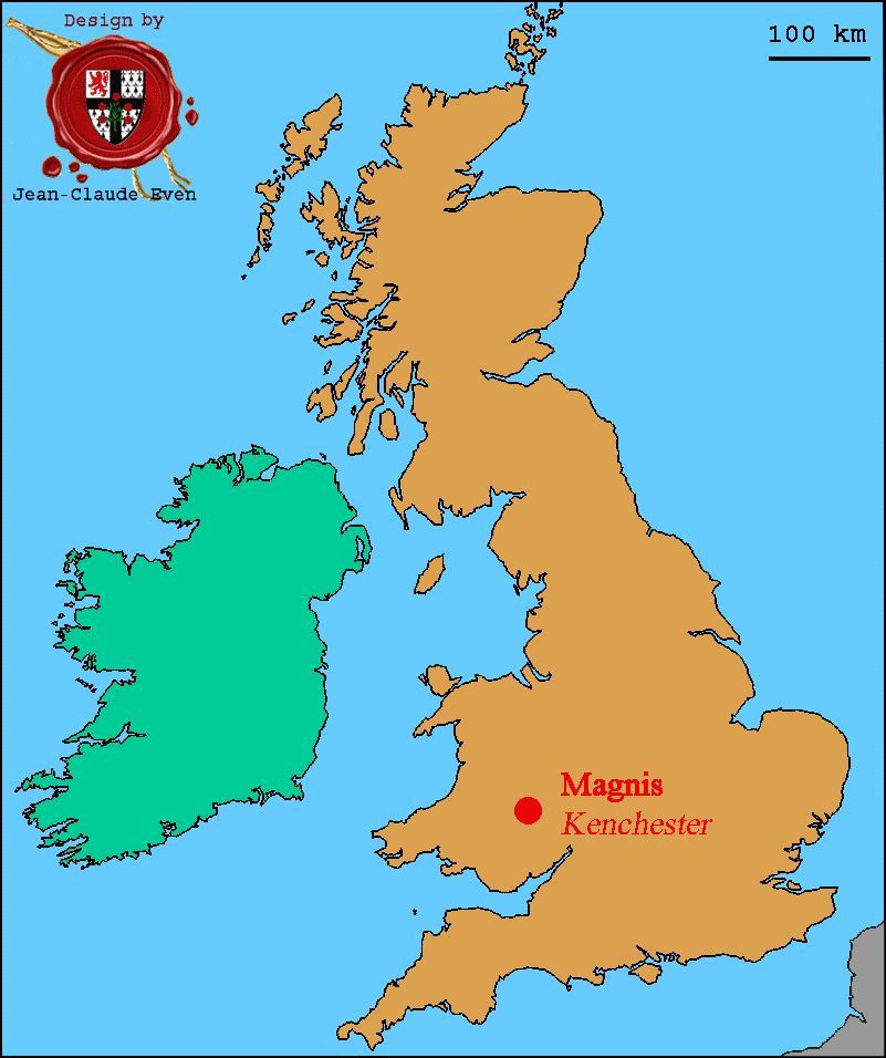 Kenchester-Magnis